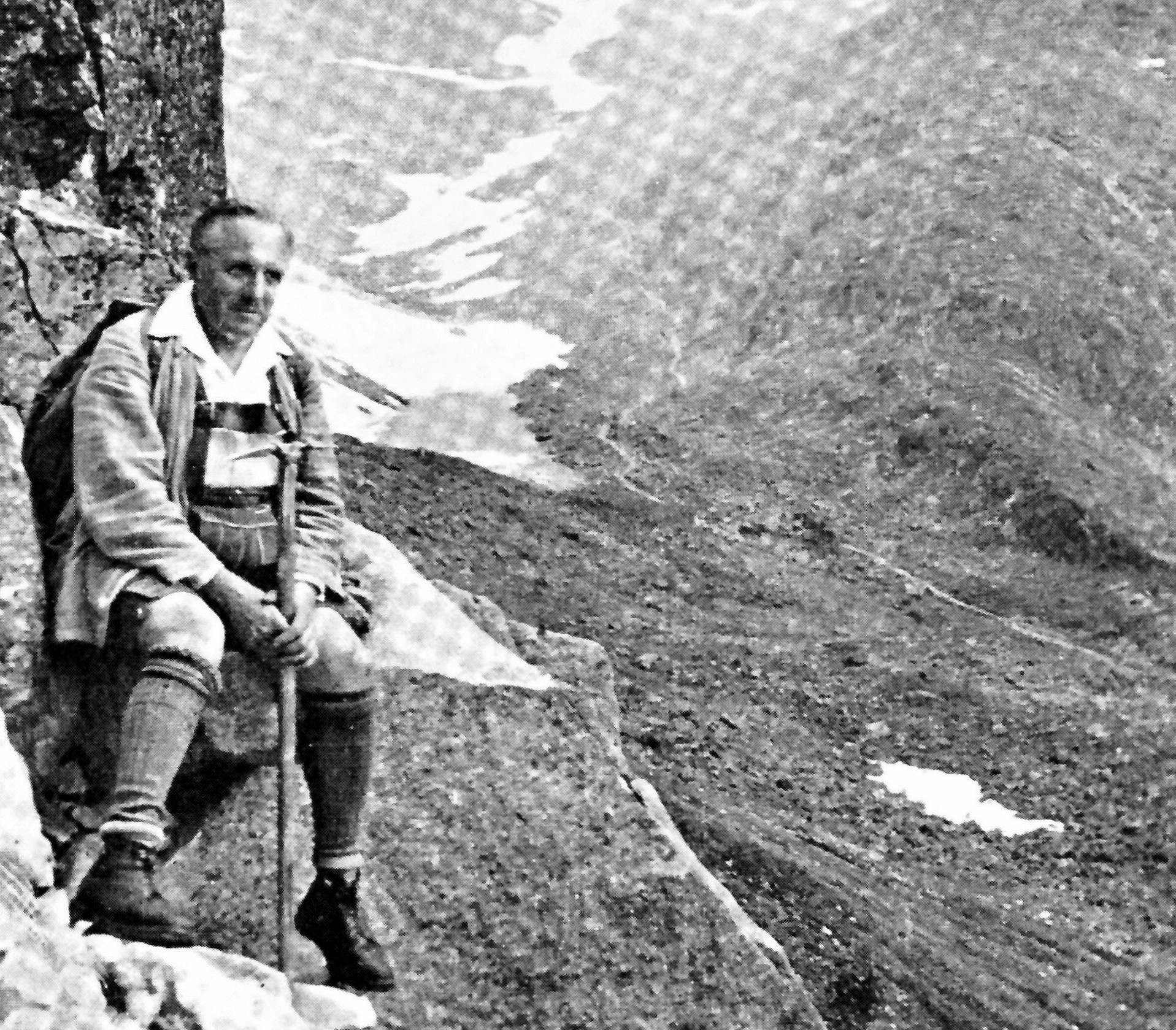 Zakladateľ a spolumajiteľ liečebného ústavu v Tatranskej Polianke a lekár MUDr. Michal Guhr, propagátor turistiky športu, horolezectva a kúpeľnej liečby vo Vysokých Tatrách